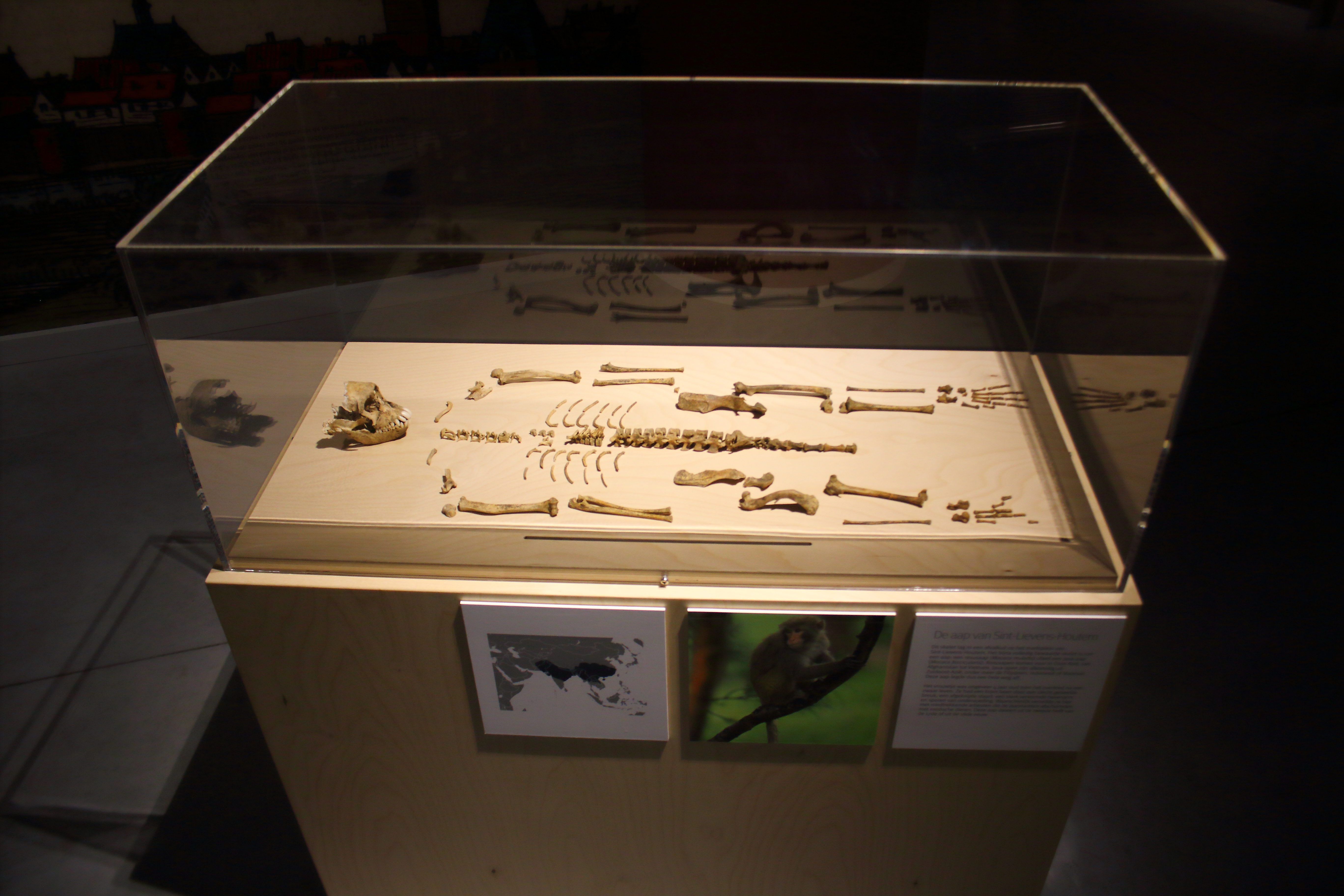 aapje gevonden in een afvalkuil onder de Markt van Sint-Lievens-Houtem. Deze Java-aap of resus-aap stamt uit de tweede helft 17de eeuw of uit de 18de eeuw. Vermoedelijk meegereisd met rondtrekkende artiesten die de jaarmarkt(en) afschuimden. (tijdelijke tentoonstelling 'Landschap doorgrond', Provinciaal Archeocentrum Velzeke)